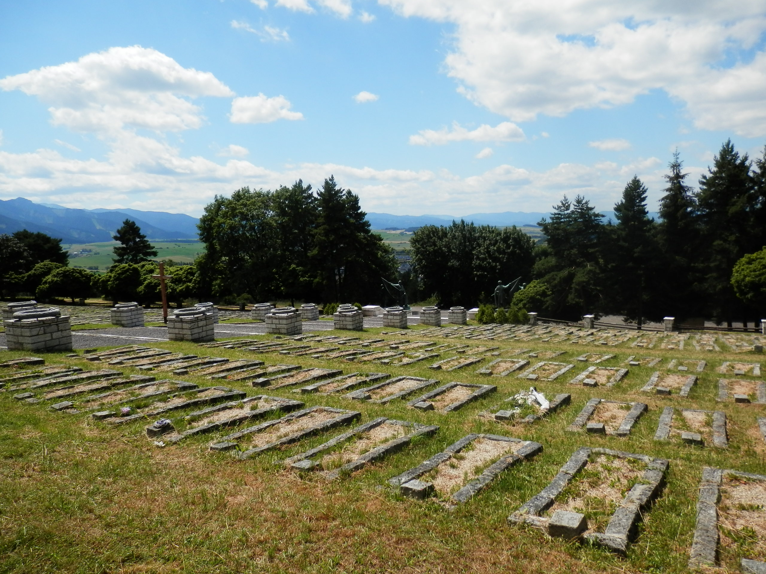 Na vojenskom cintoríne, po oboch stranách schodiska, je v 10 radoch pochovaných 1 361 príslušníkov 1. československého armádneho zboru, ktorí v roku 1945 padli v bojoch pri Liptovskom Mikuláši.